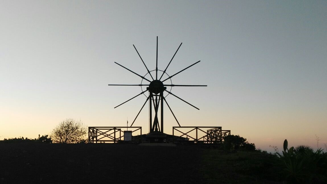 Uno de los cuatro molinos viento que quedan en pie en la zona de Garafía.